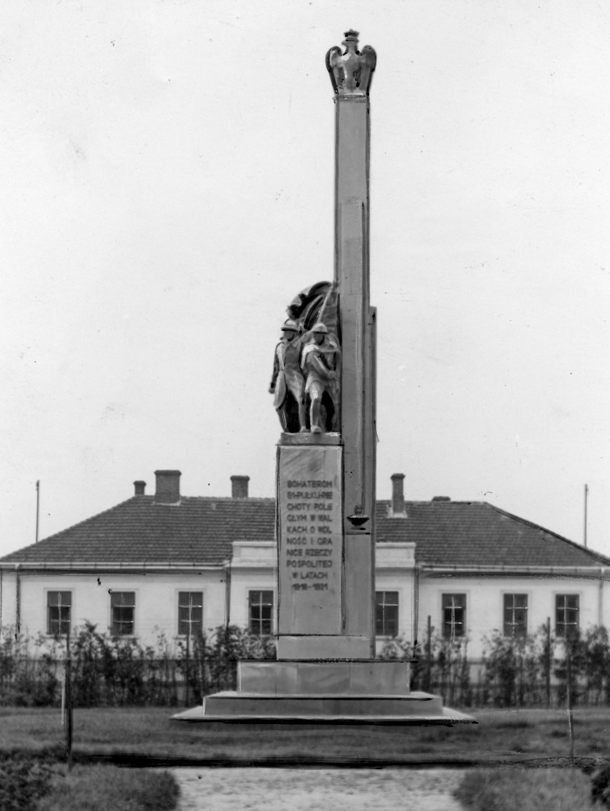 Brzeżany; woj. tarnopolskie. Pomnik ku czci poległych żołnierzy 51 pułku piechoty. Koncern Ilustrowany Kurier Codzienny - Archiwum Ilustracji. Sygnatura: 1-U-354